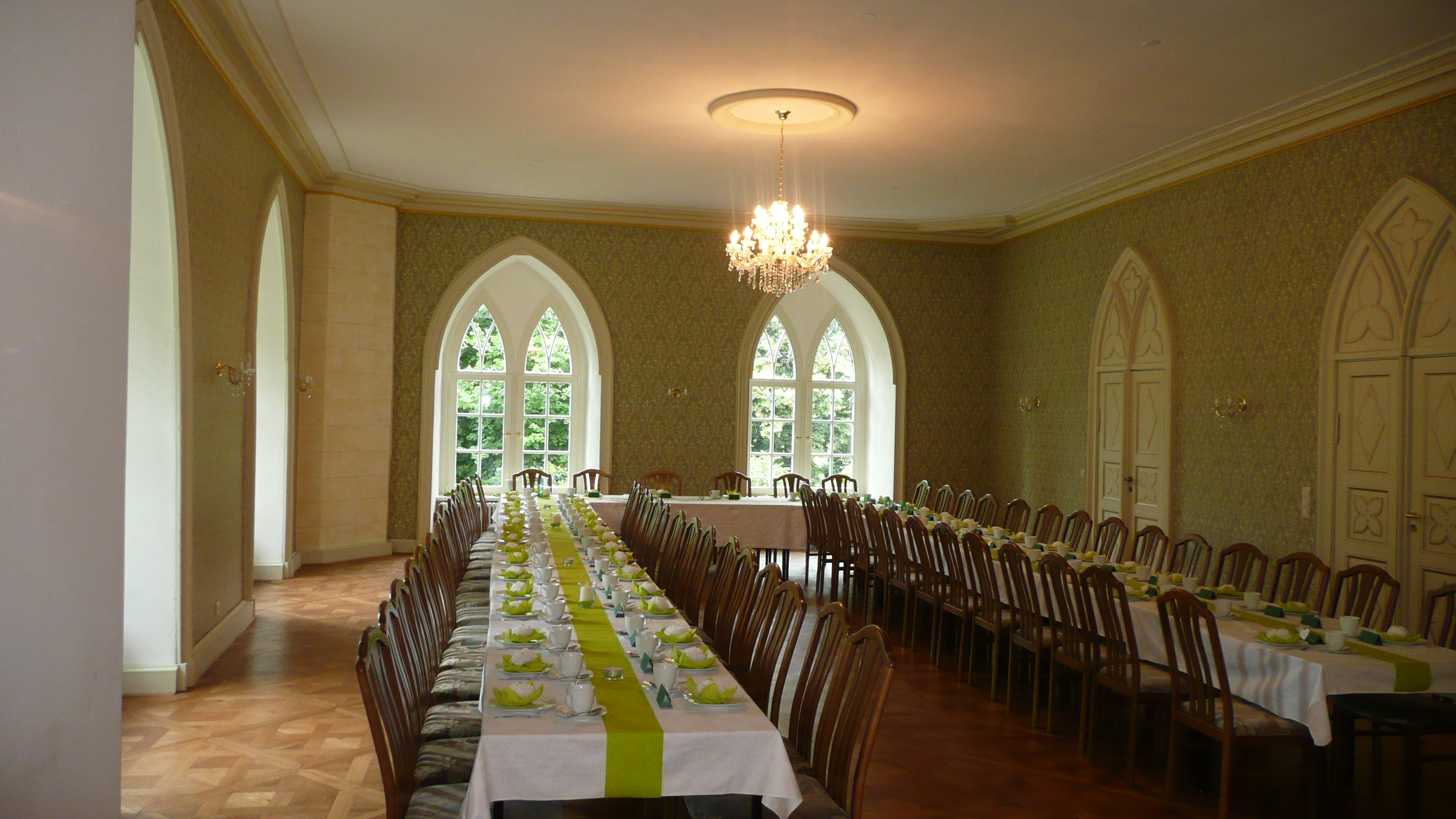 Schloss Seifersdorf in Sachsen